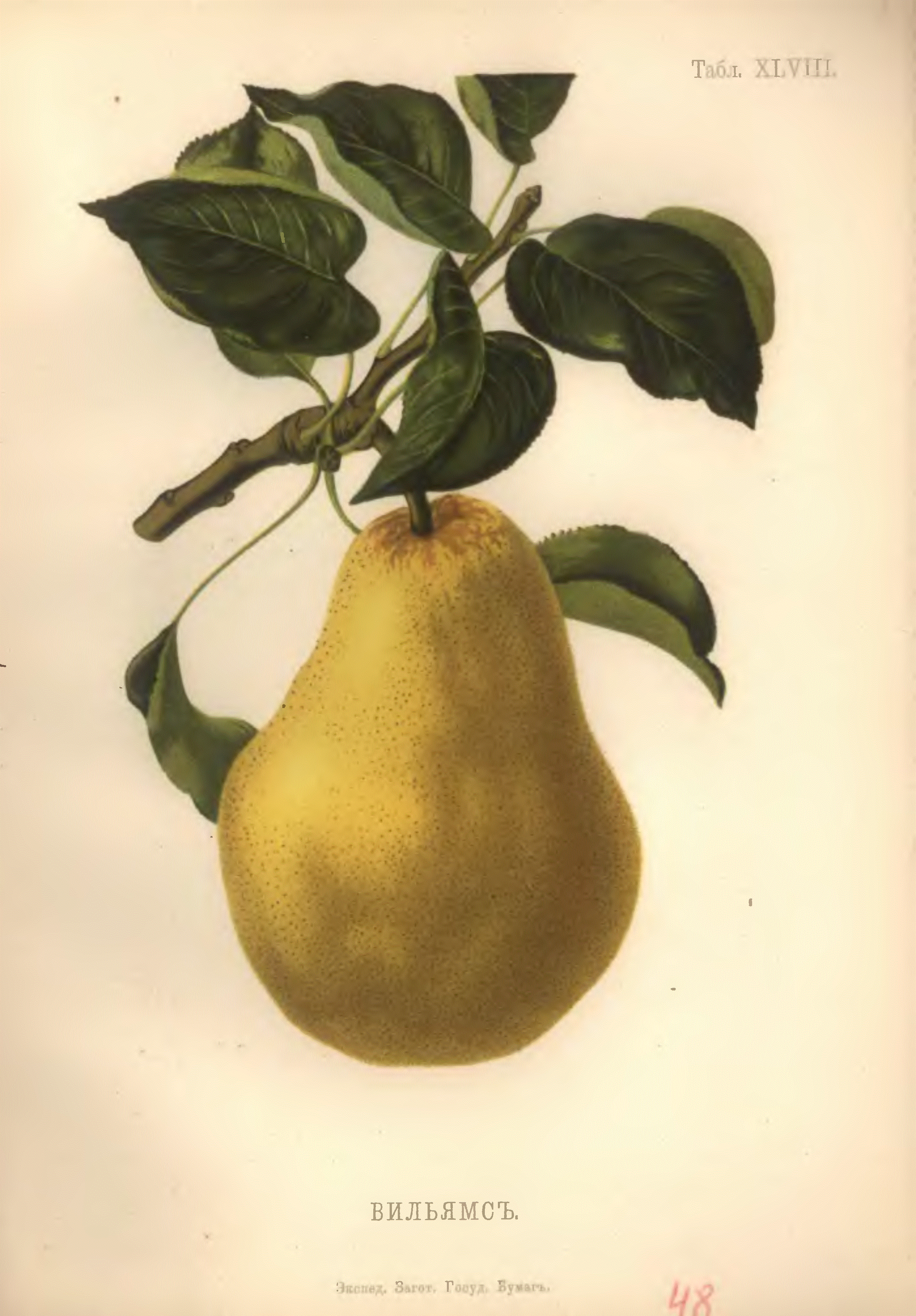 Вильямс